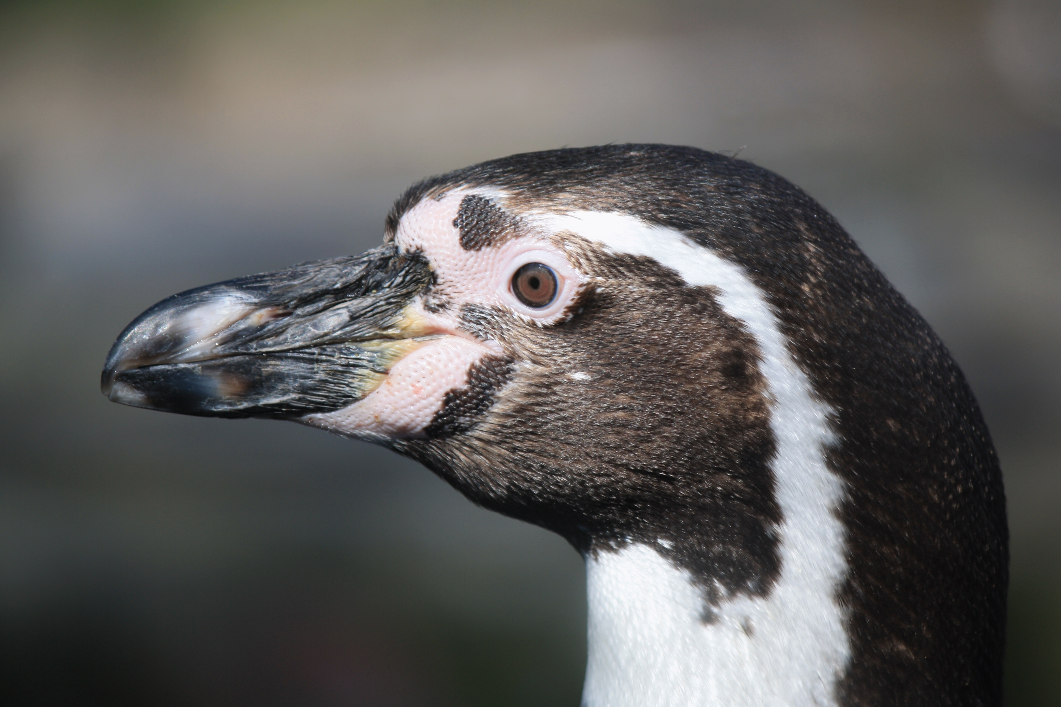 Tučňák Humboldtův v pražské Zoo